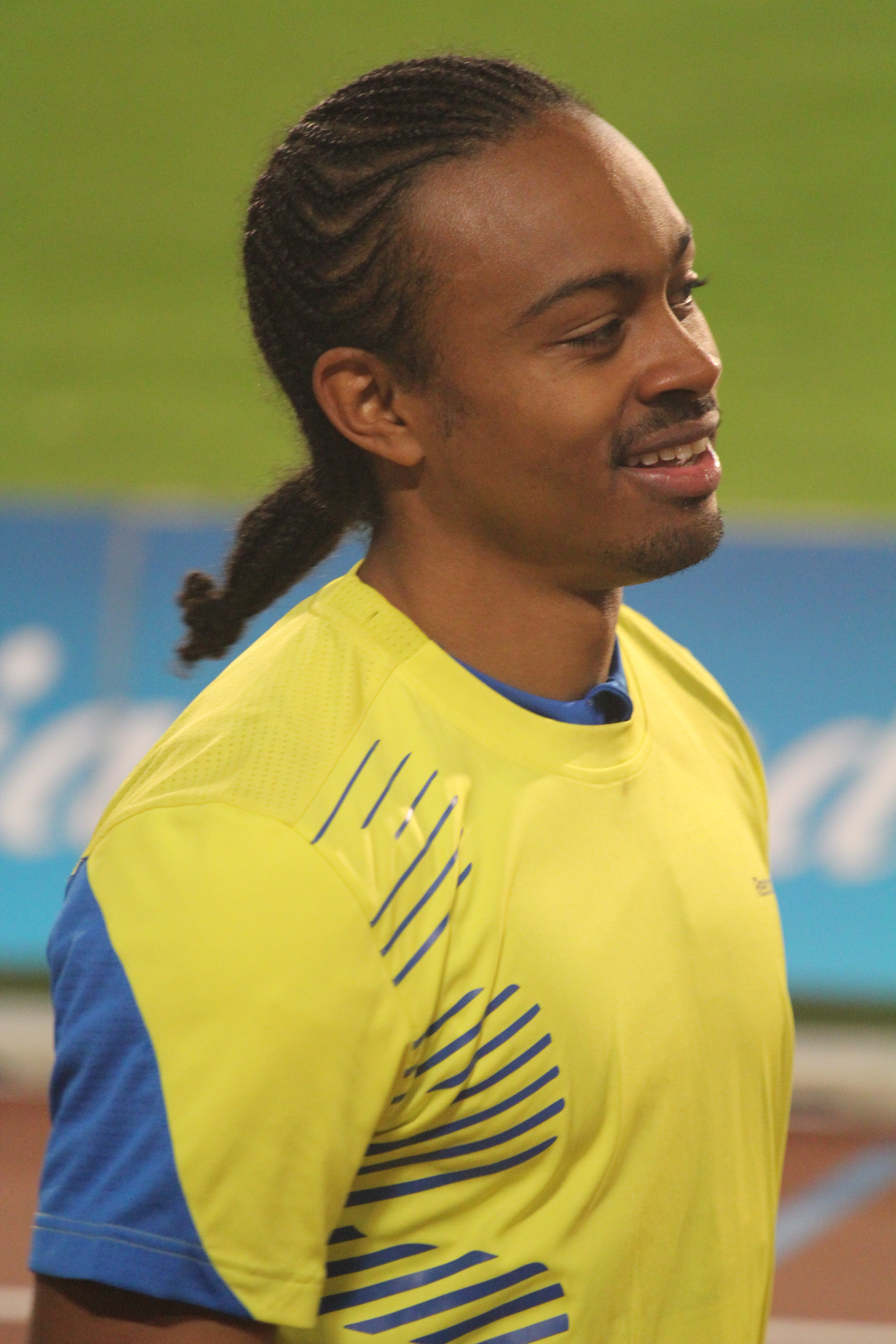 Brussels, Memorial Van Damme, Aries Merritt